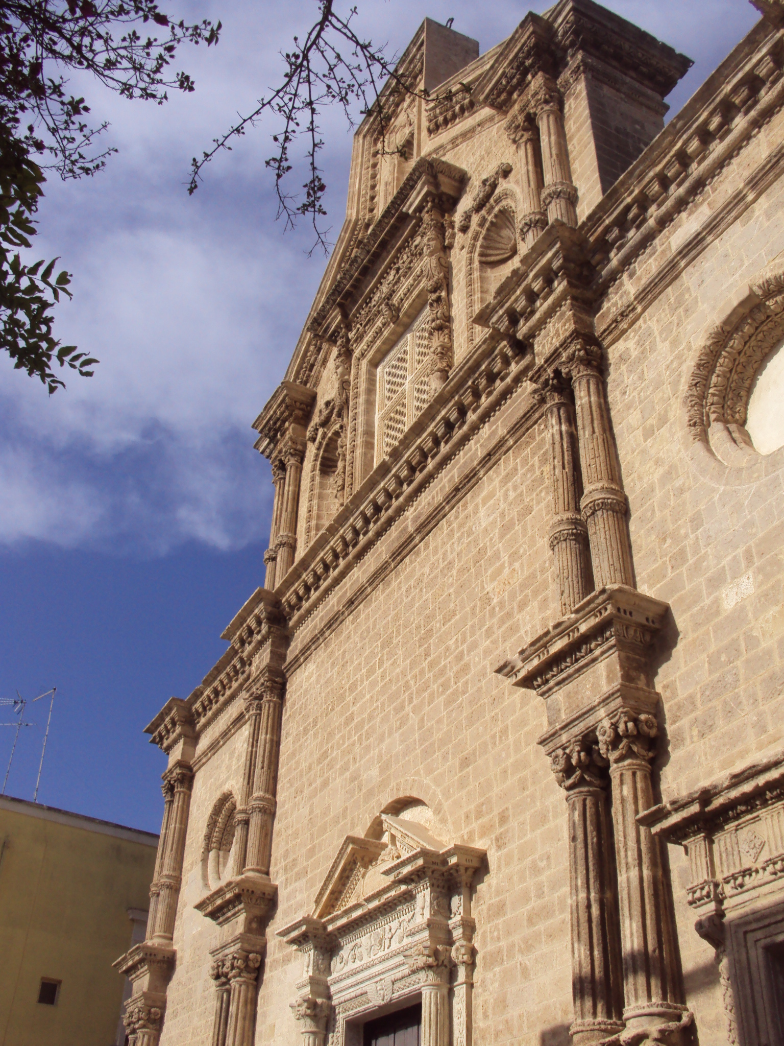 L'église de la Santissima Annunziata, dite aussi Chiesa Matrice, de Leverano, province de Lecce, Pouilles, Italie.